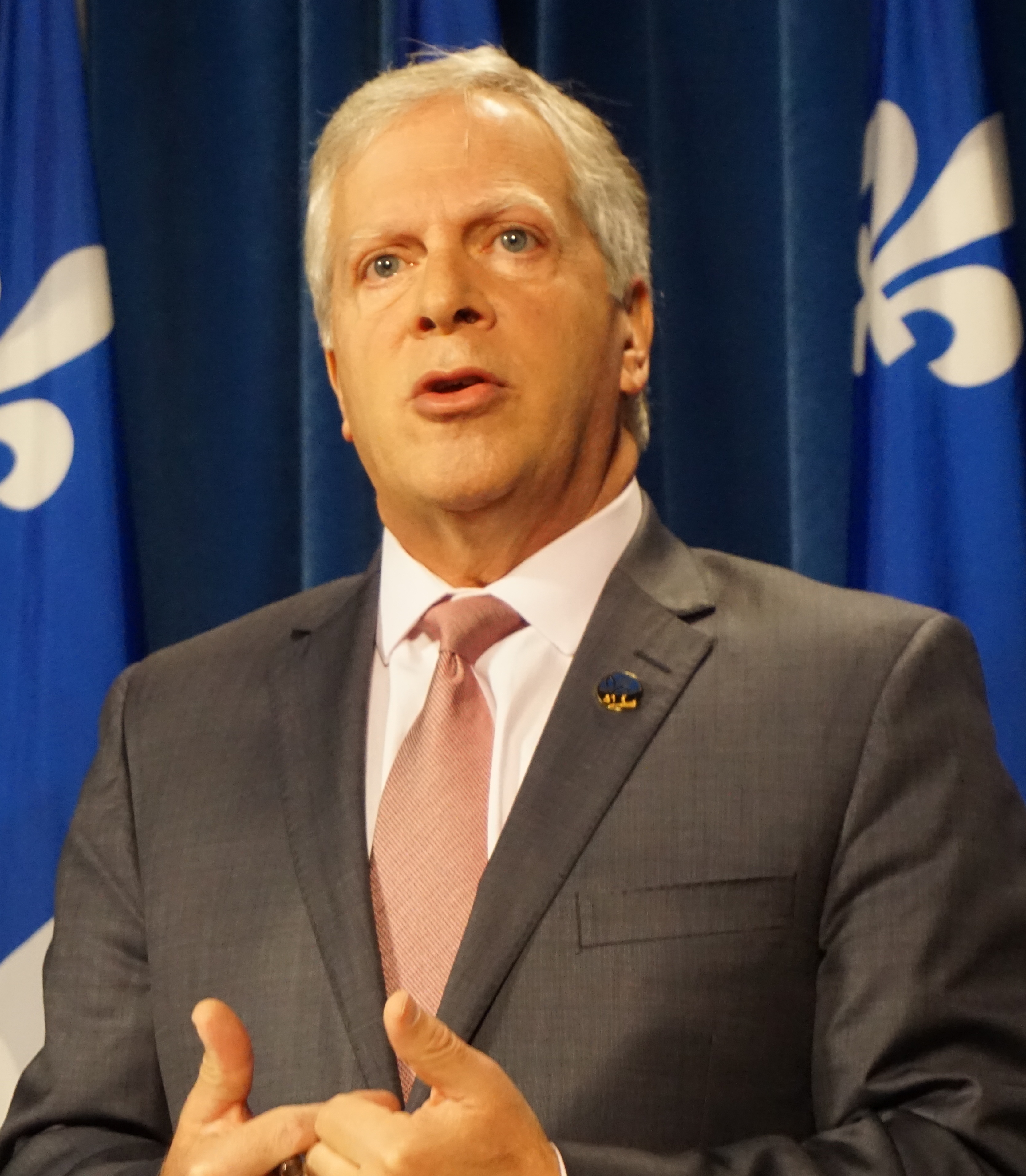 François Paradis, député de Lévis